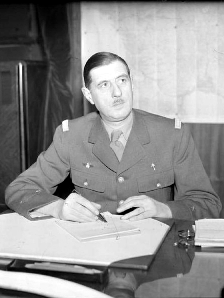 Second World War Personalities- Charles De Gaulle D1966(cropped)